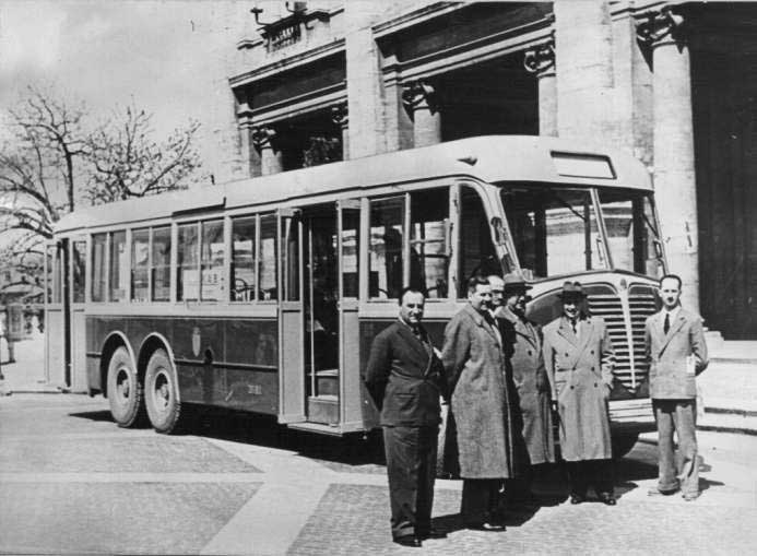 Autobus Alfa Romeo 140-A di Roma